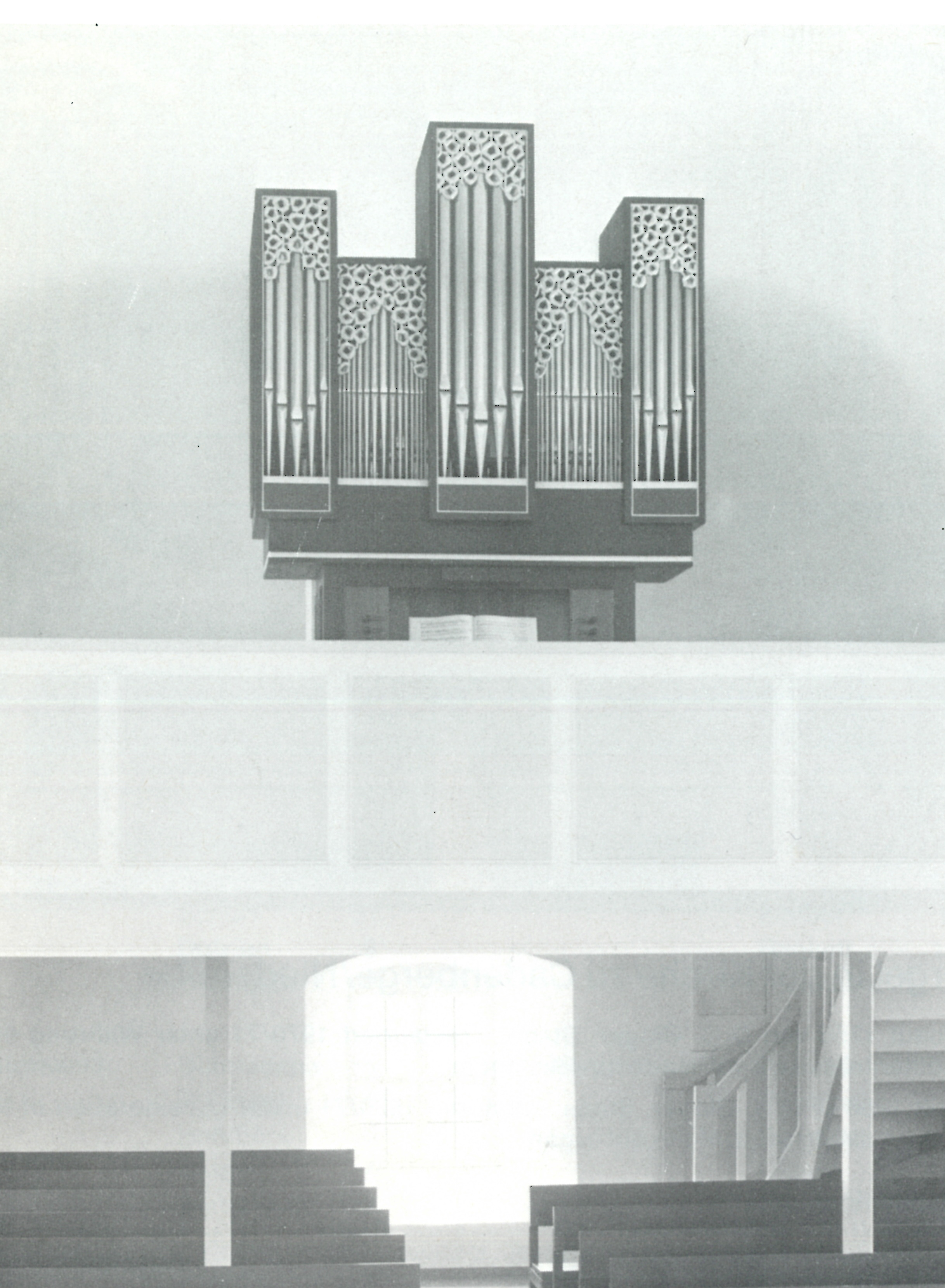 Orgel in Jühnde, St.-Martini-Kirche